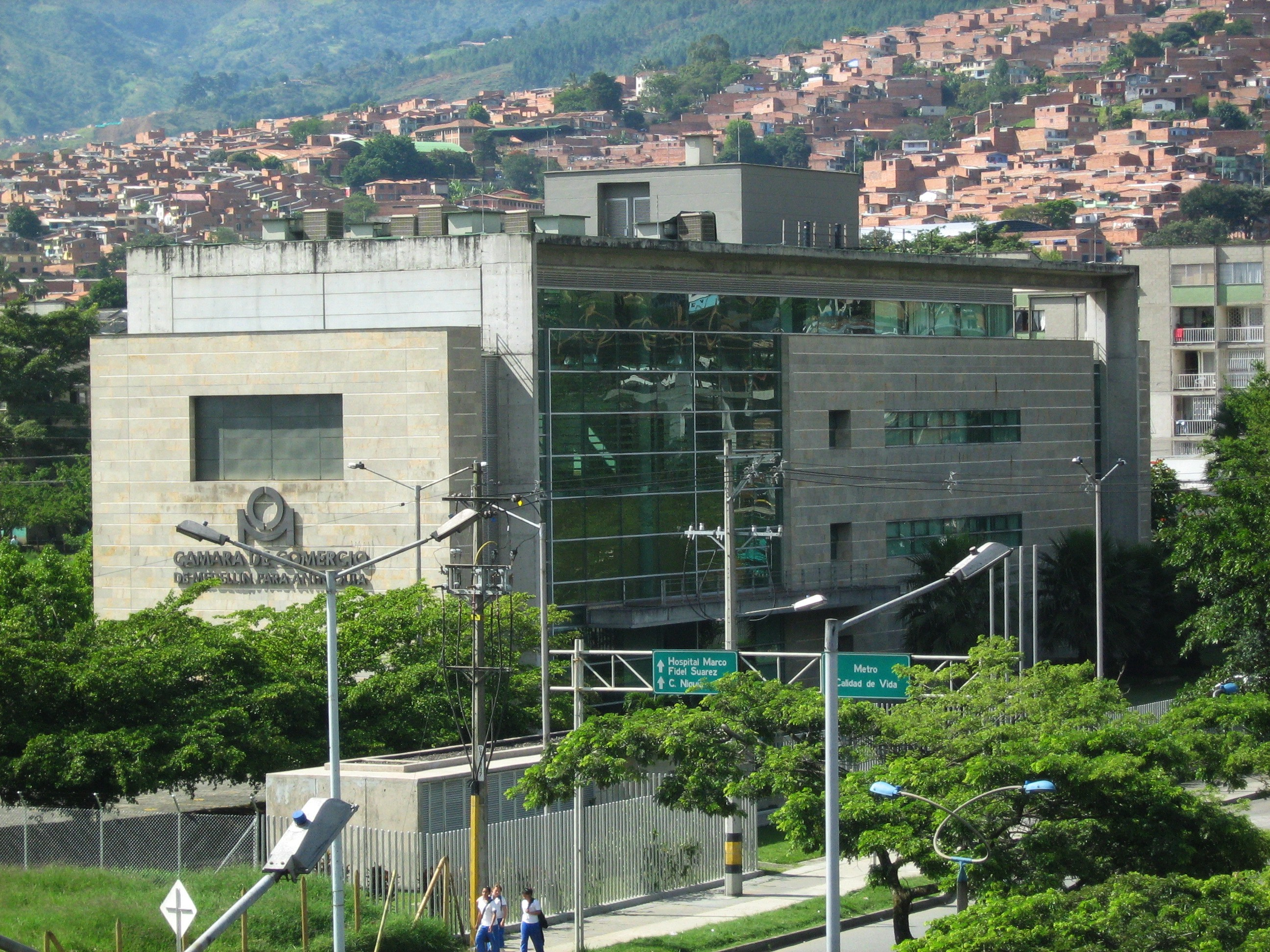 Cámara de Comercio de Medellín sede Norte (Bello), Antioquia. colombia